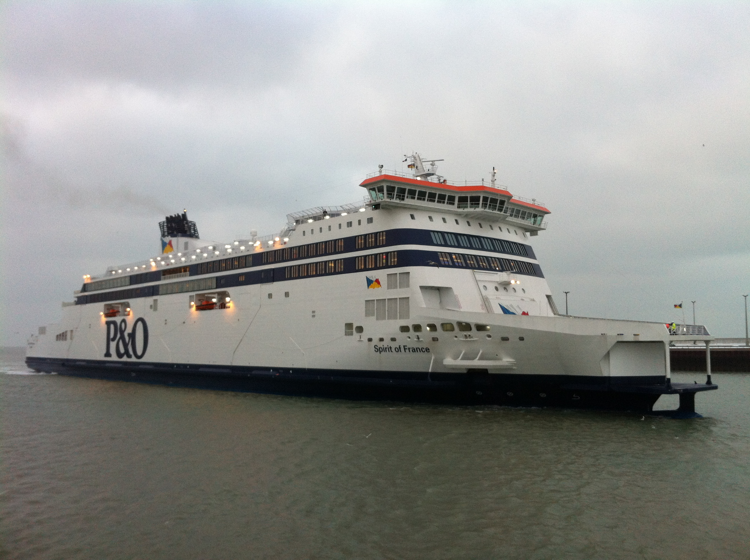 Le Spirit of France de la Compagnie P&O Ferries, lors de son premier essai au port de Calais.